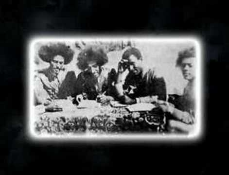 Gruppo di arbegnuoc